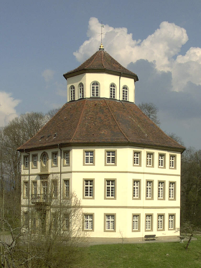 Achteckiger Bau des ehemaligen Schlosses von Oppenweiler. Das Gebäude dient heute als Rathaus.